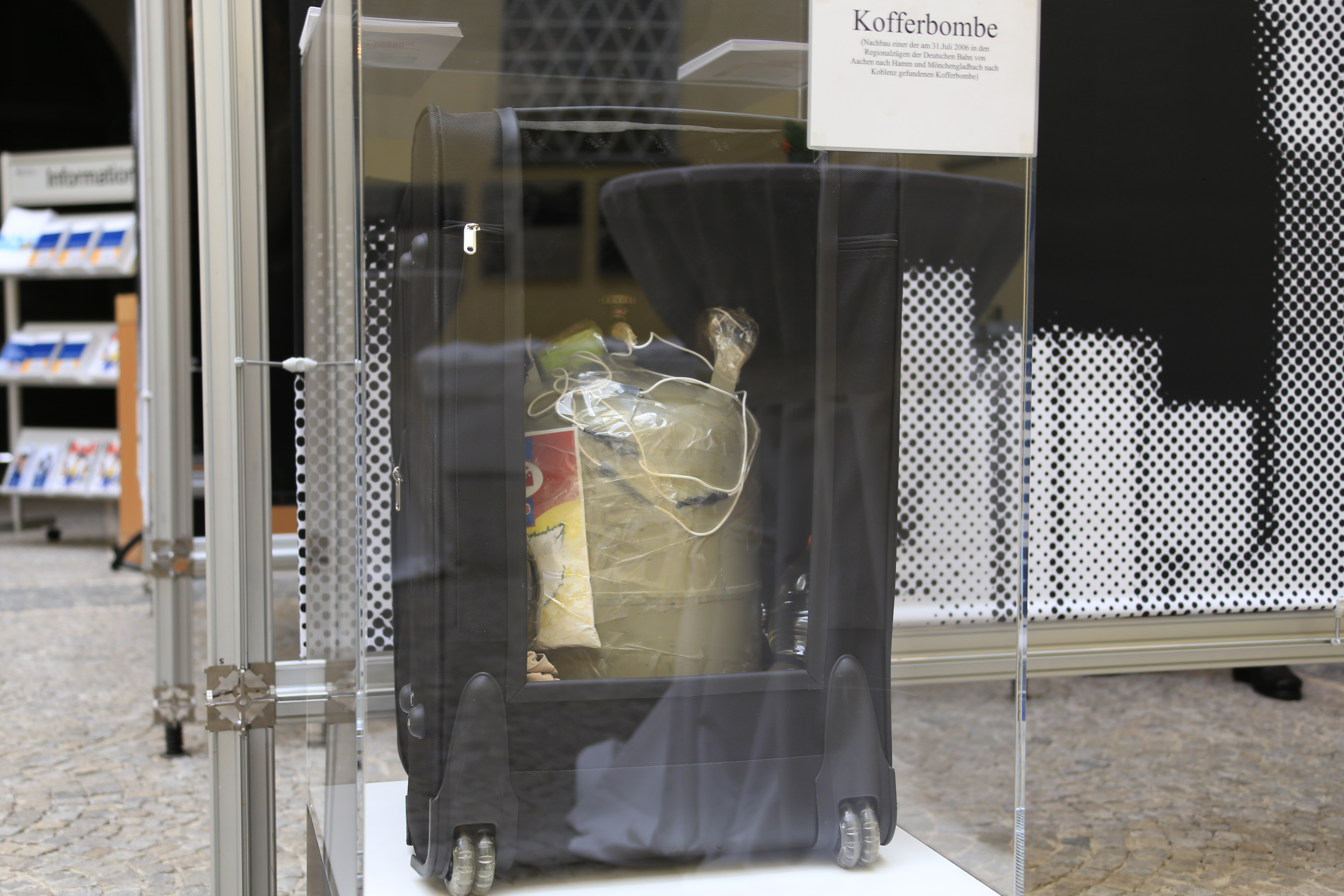 Kofferbombe (Nachbau einer der am 31. Juli 2006 in den Regionalzügen der Deutschen Bahn von Aachen nach Hamm und Mönchengladbach nach Koblenz gefundenen Kofferbombe). Ausstellung "Die missbrauchte Religion - Islamisten in Deutschland" am 10. Juli 2014 in München. Die Wanderausstellung wurde vom Bundesamt für Verfassungsschutz konzipiert und befindet sich bis zum 22. Juli 2014 im Odeon des Bayerischen Staatsministeriums des Innern, für Bau und Verkehr. [1]